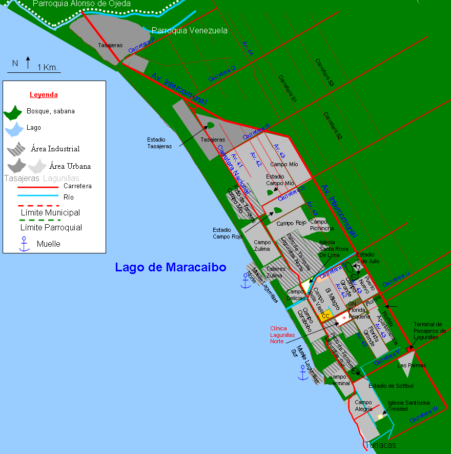 Mapa de la ciudad de Lagunillas. Municipio Lagunillas. Estado Zulia. Venezuela. Sólo se muestran las calles principales. Se muestra junto al pueblo conurbado de Tasajeras, no se ve conurbado en el mapa porque Tasajeras está en proceso de abandono y reubicación de sus habitantes. Turiacas otro pueblo al que se hace referencia en la parte inferior derecha está 98 % abandonado y es un pueblo fantasma.